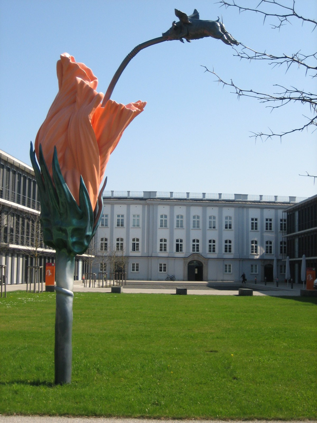 Hochschule Augsburg, beim Roten Tor; Kunstwerk auf dem Campus